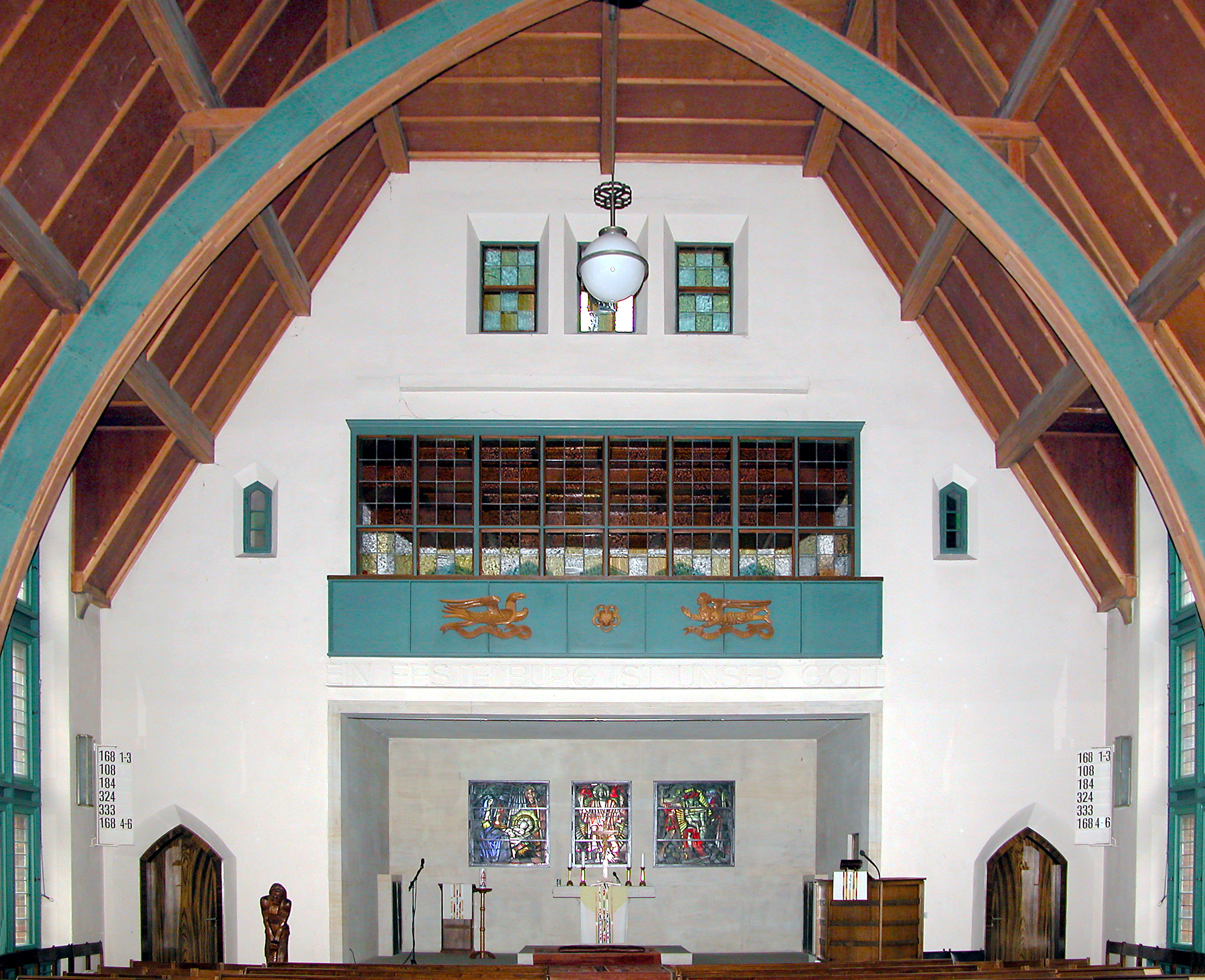 10.05.2007 01129 Dresden-Trachau, Kopernikusstraße (GMP: 51.092351,13.710367): Apostelkirche. Architekt war Prof. Oswin Hempel, Bauzeit 1927-1929. Blick zum Altar. [DSCN27922.TIF]20070510020DR.JPG(c)Blobelt